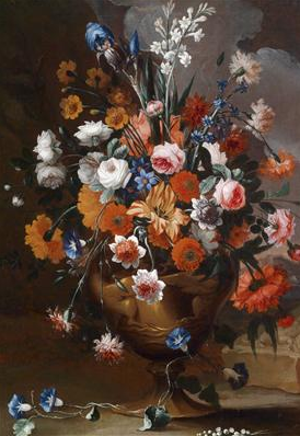 Arrangement von Blumen in einer Vase